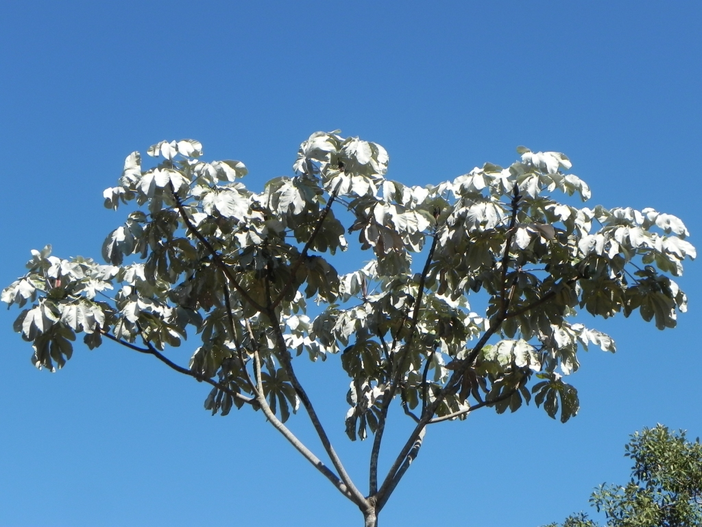 Cecropia hololeuca. Parque Estadual do Rio Preto, São Gonçalo do Rio Preto, Minas Gerais, Brasil.